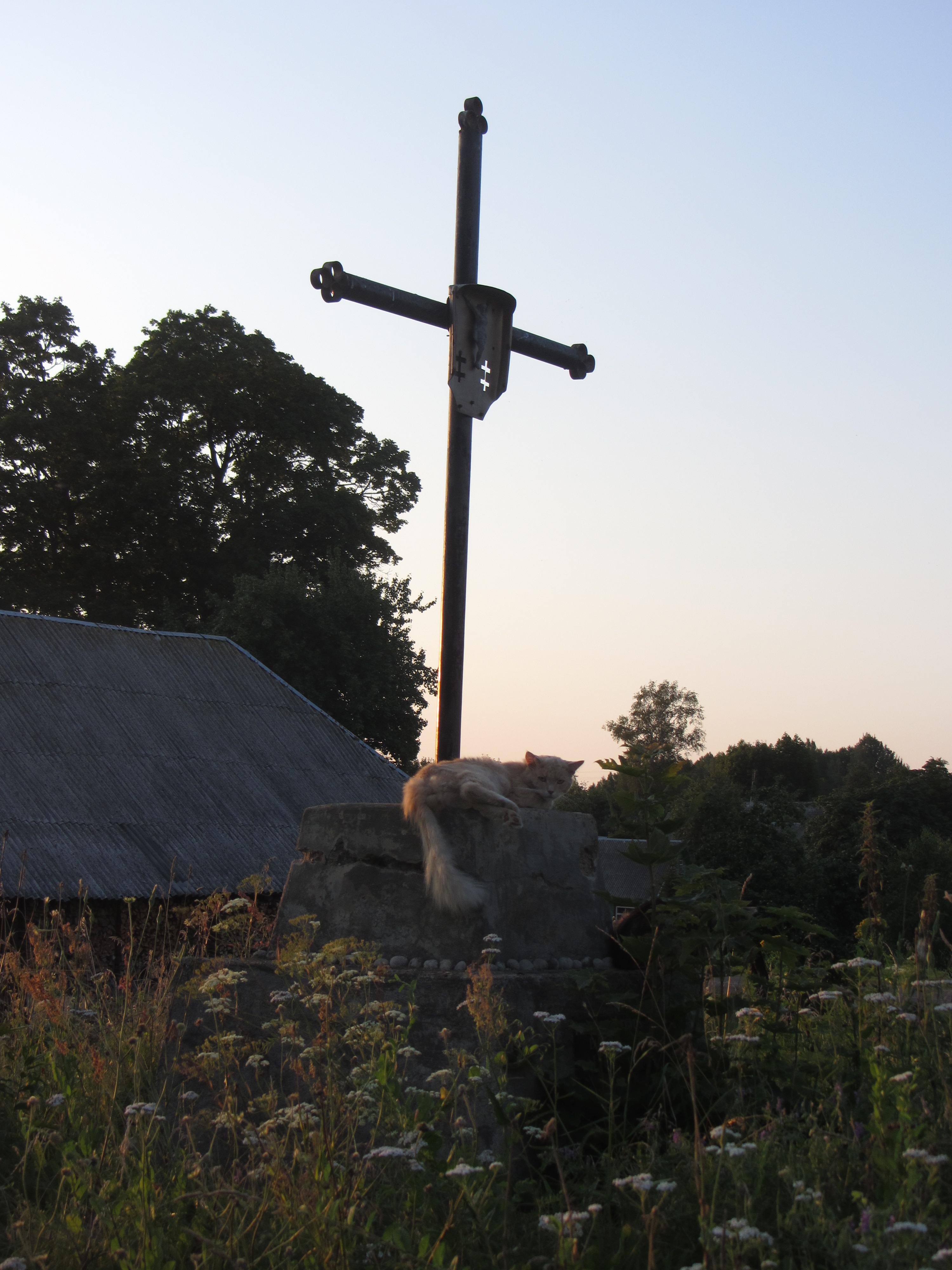 Maksimonys 30232, Lithuania